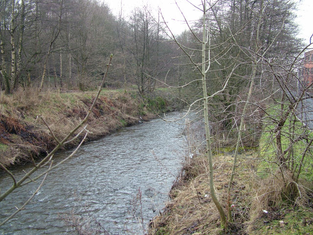 River Brun in Burnley